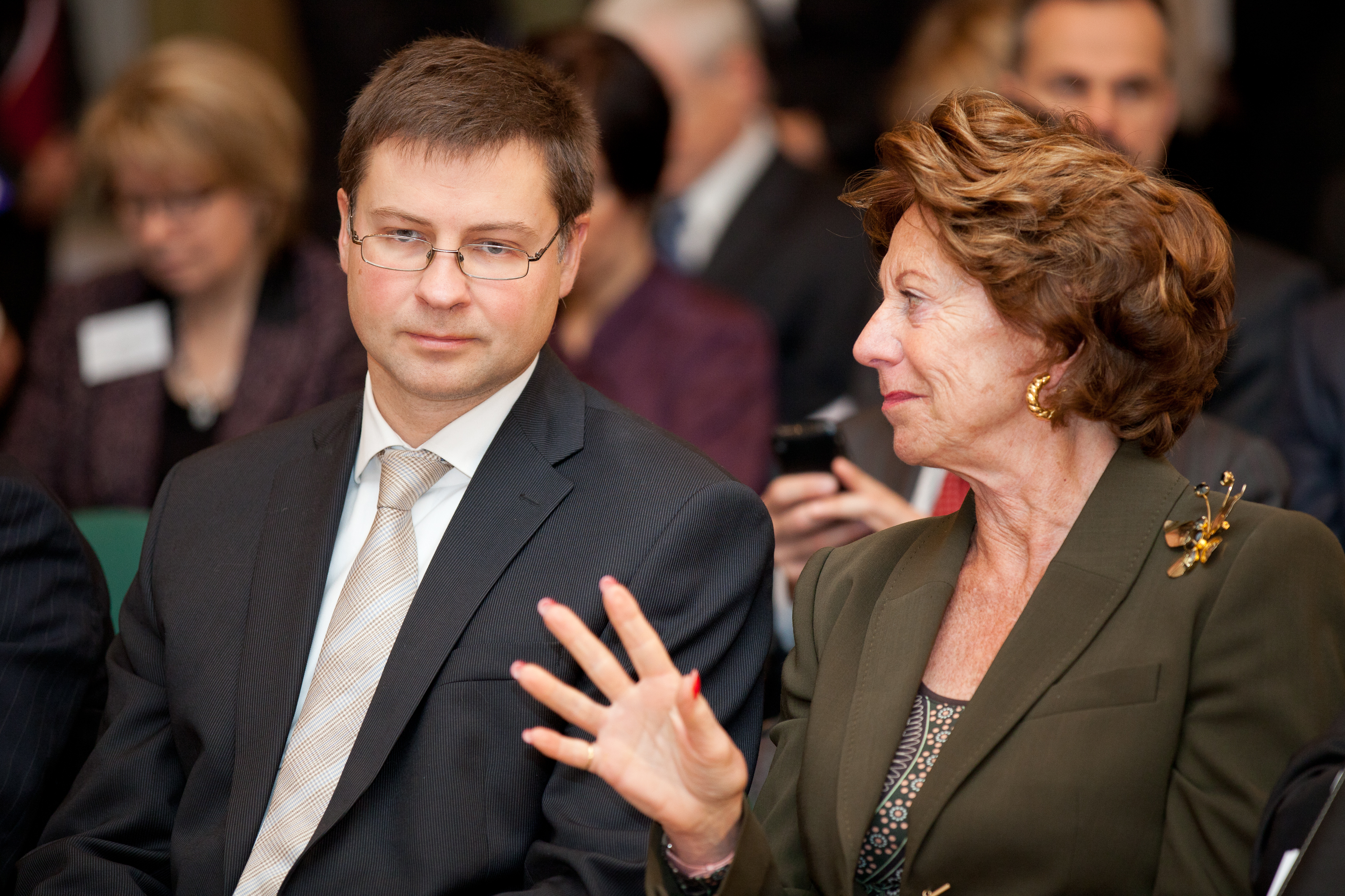 Ministru prezidents Valdis Dombrovskis sarunā ar EK priekšsēdētāja vietnieci, digitālās programmas komisāre Nēlī Krusu. Foto: Valsts kanceleja